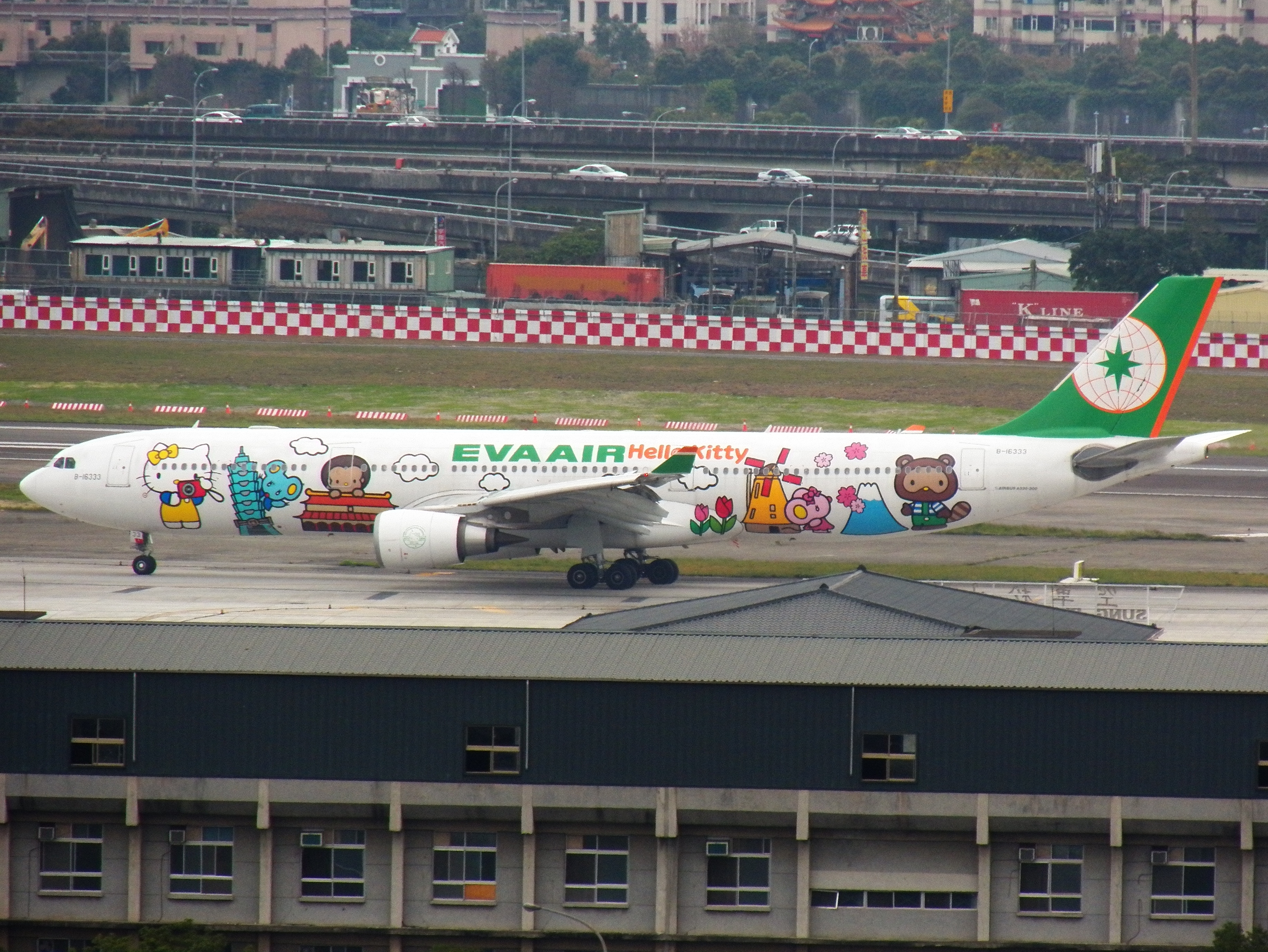 往臺北松山機場航站大樓移動中的長榮航空A330-300 HELLO KITTY環遊世界機。